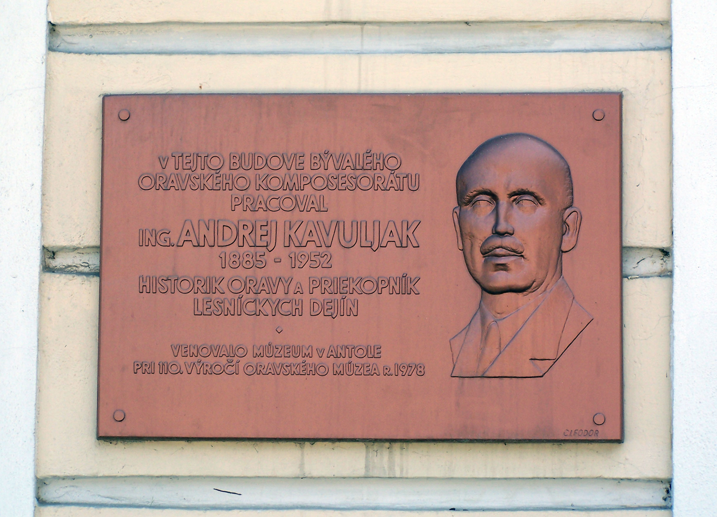 Memorial plaque to historian Andrej Kavuljak in Oravský Podzámok, Slovakia